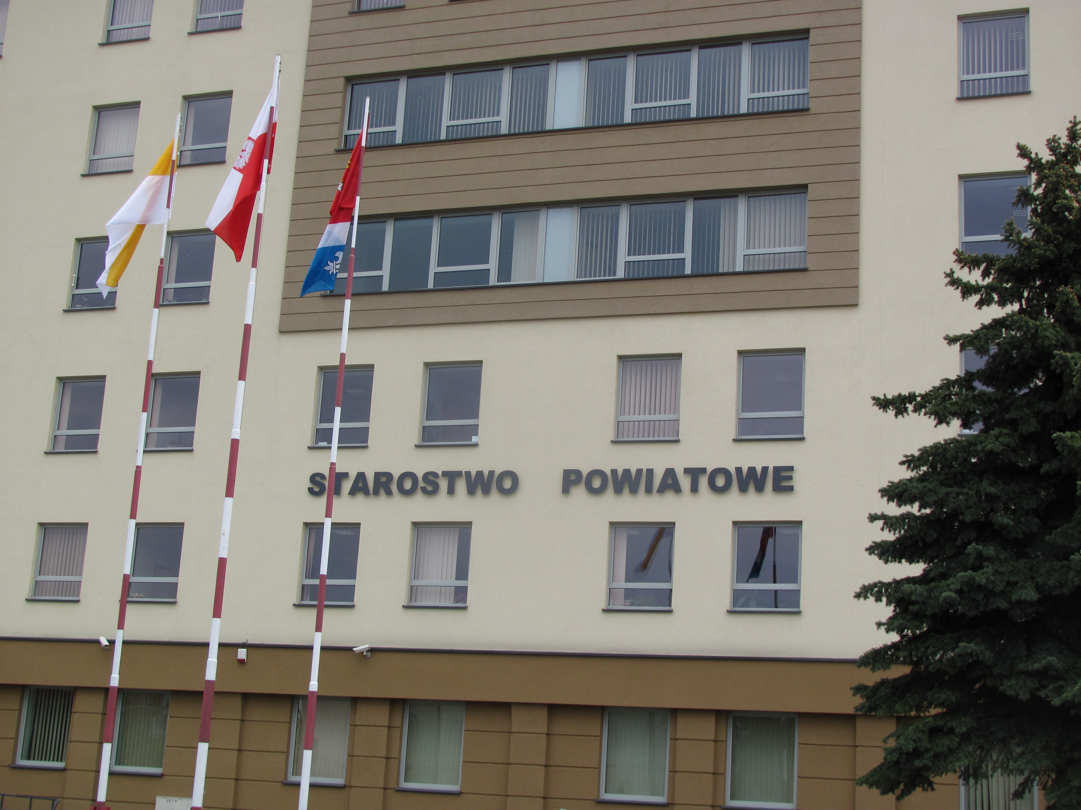 Starostwo Powiatowe w Dębicy